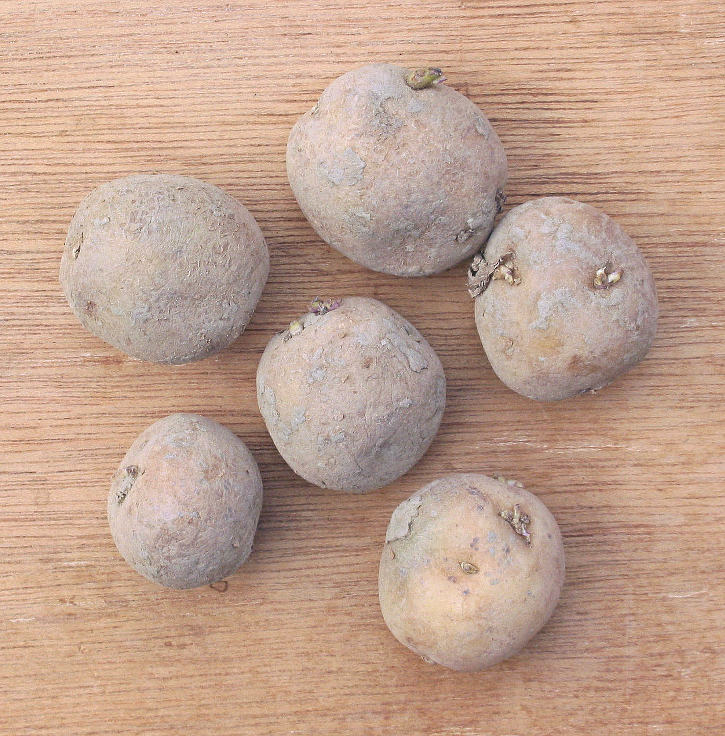 (nl: Aardappel Doré poters) Solanum tuberosum seed potatoes size 30 - 40 mm